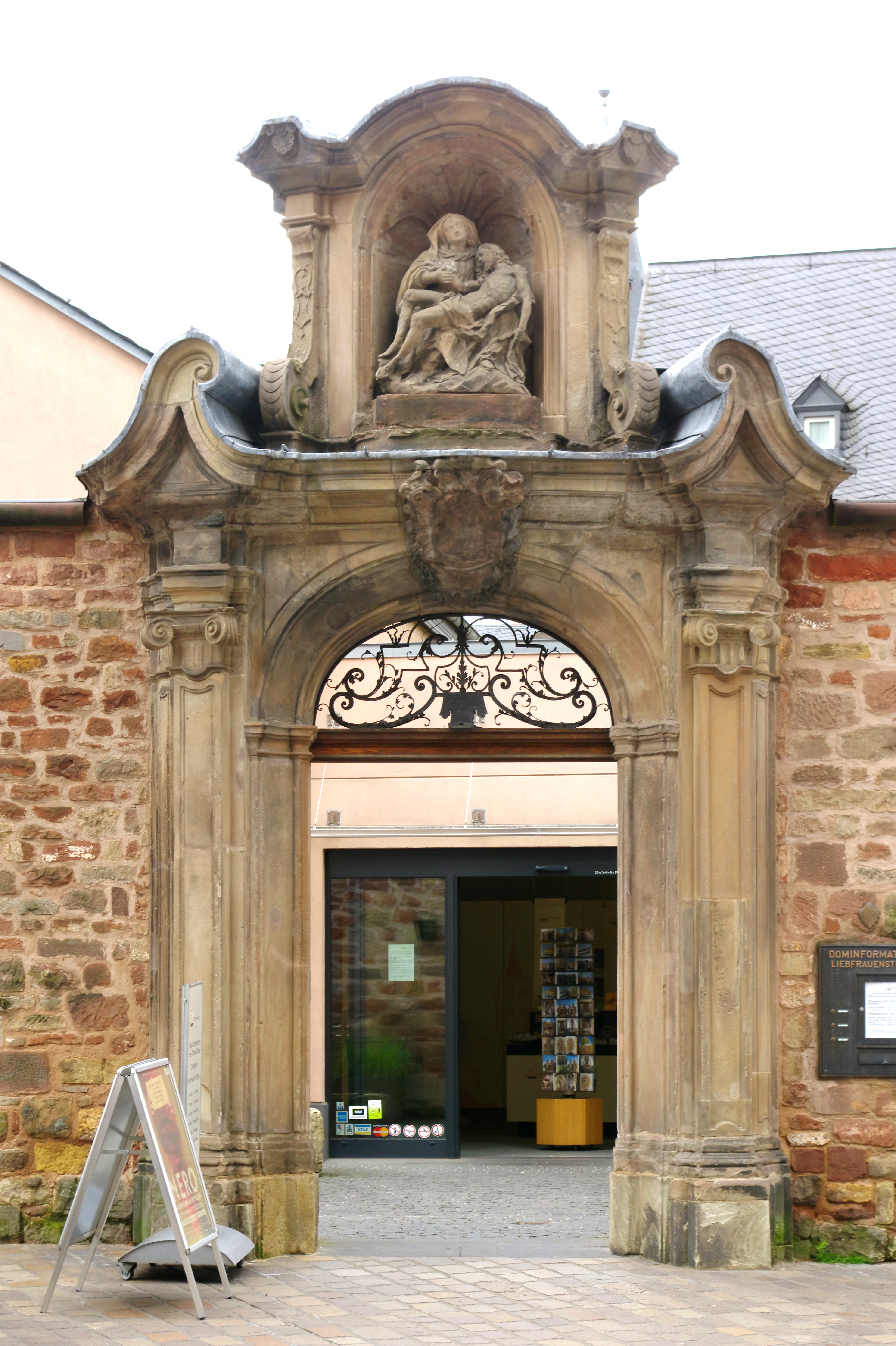 Portal an der Dominformation, stand früher am Agnetenkloster